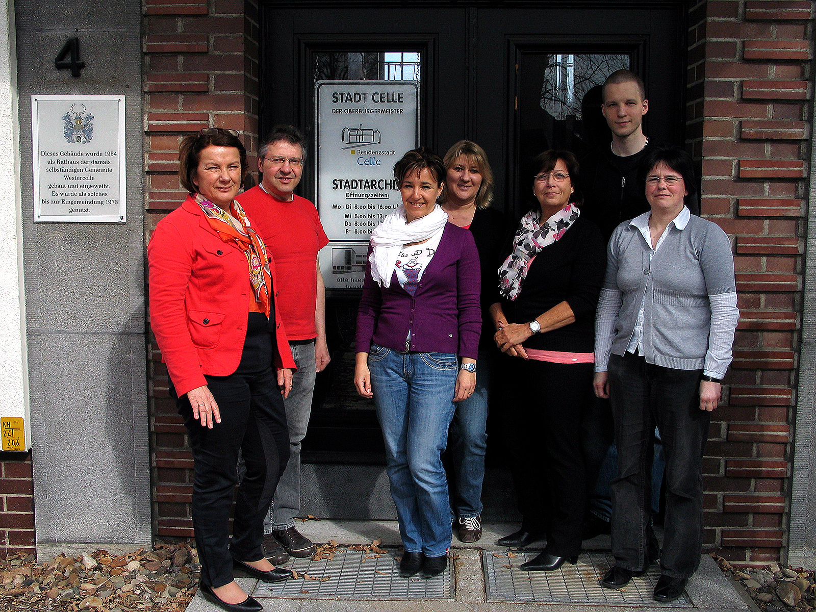 Das Team vom Stadtarchiv Celle vor dem Eingang des sogenannten Alten Rathauses von Westercelle, Westerceller Straße 4 in Celle, von links: Sabine Maehnert, Günter Netbal, Petra Bogdanski, Heike Sperac, Heike Young, Julian Hartig und Michaela Engel. Mitarbeiter Benjamin Geier war zu dieser Stunde nicht zugegen ...